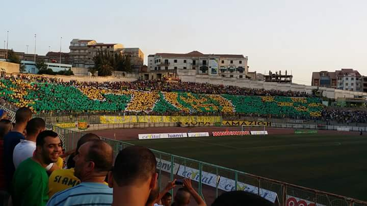 TIFO des Zona Amaigh des supporters de JSKabylie dans le clasico d'algérie